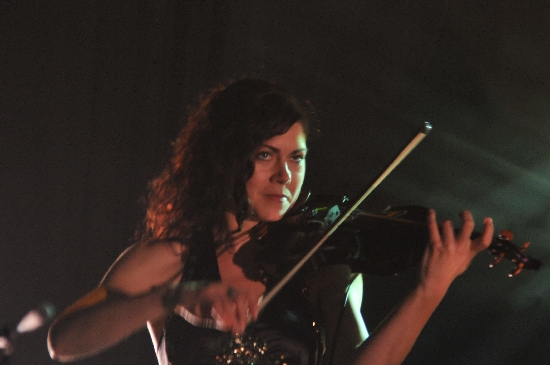 Anna Katharina Kränzlein von Schandmaul während eines Auftritts auf dem Freiburger Zelt-Musik-Festival 2011